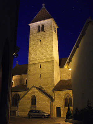 Eglise St-Symphorien